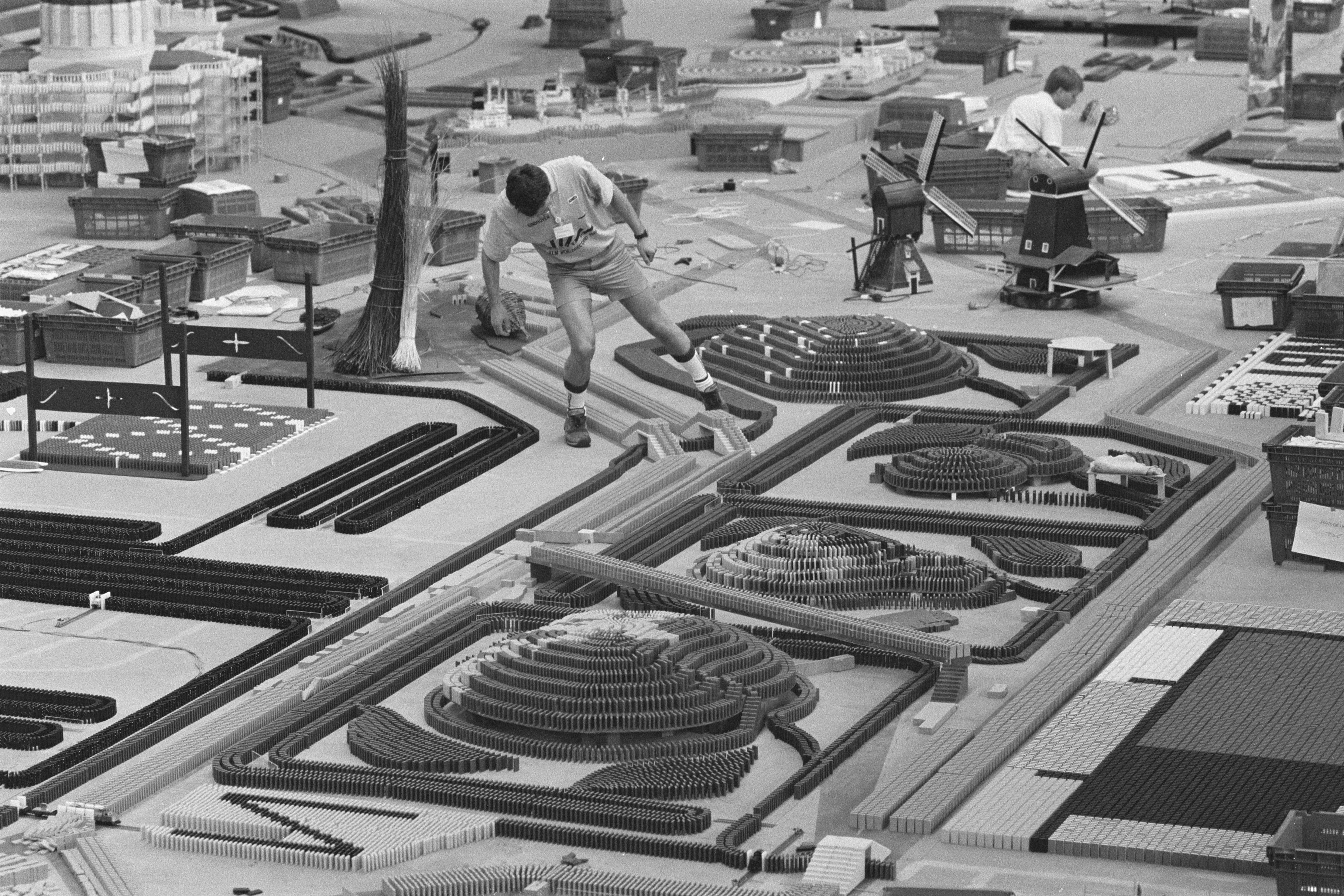 Collectie / Archief : Fotocollectie Anefo Reportage / Serie : [ onbekend ] Beschrijving : Wereldrecordpoging dominostenen omgooien in Lisse; medewerker tussen "fruit in Betuwe" Datum : 16 december 1986 Locatie : Lisse Trefwoorden : wereldrecords Fotograaf : Bogaerts, Rob / Anefo Auteursrechthebbende : Nationaal Archief Materiaalsoort : Negatief (zwart/wit) Nummer archiefinventaris : bekijk toegang 2.24.01.05 Bestanddeelnummer : 933-8418